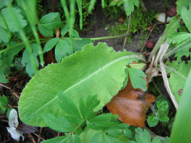 Hohe Schlüsselblume Primula elatior, Rügen